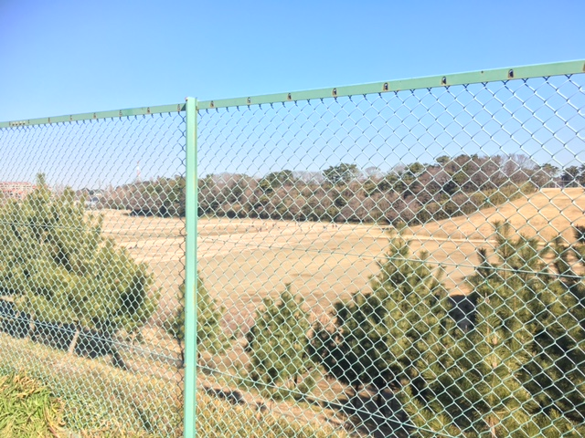 2017年1月24日撮影